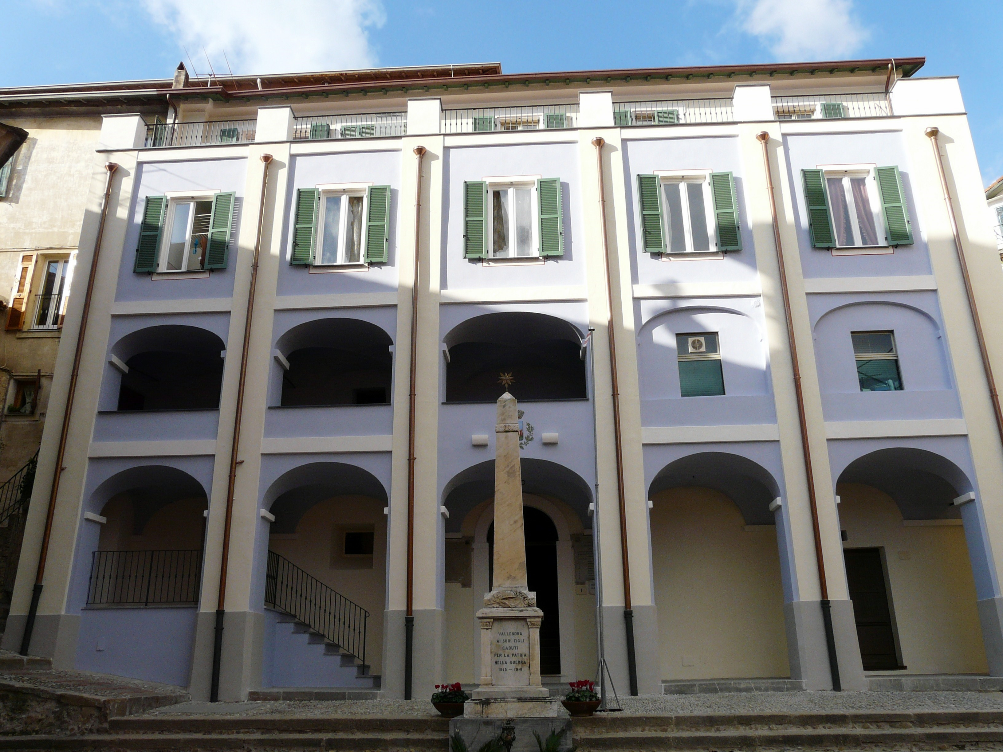 Municipio di Vallebona, Liguria, Italia